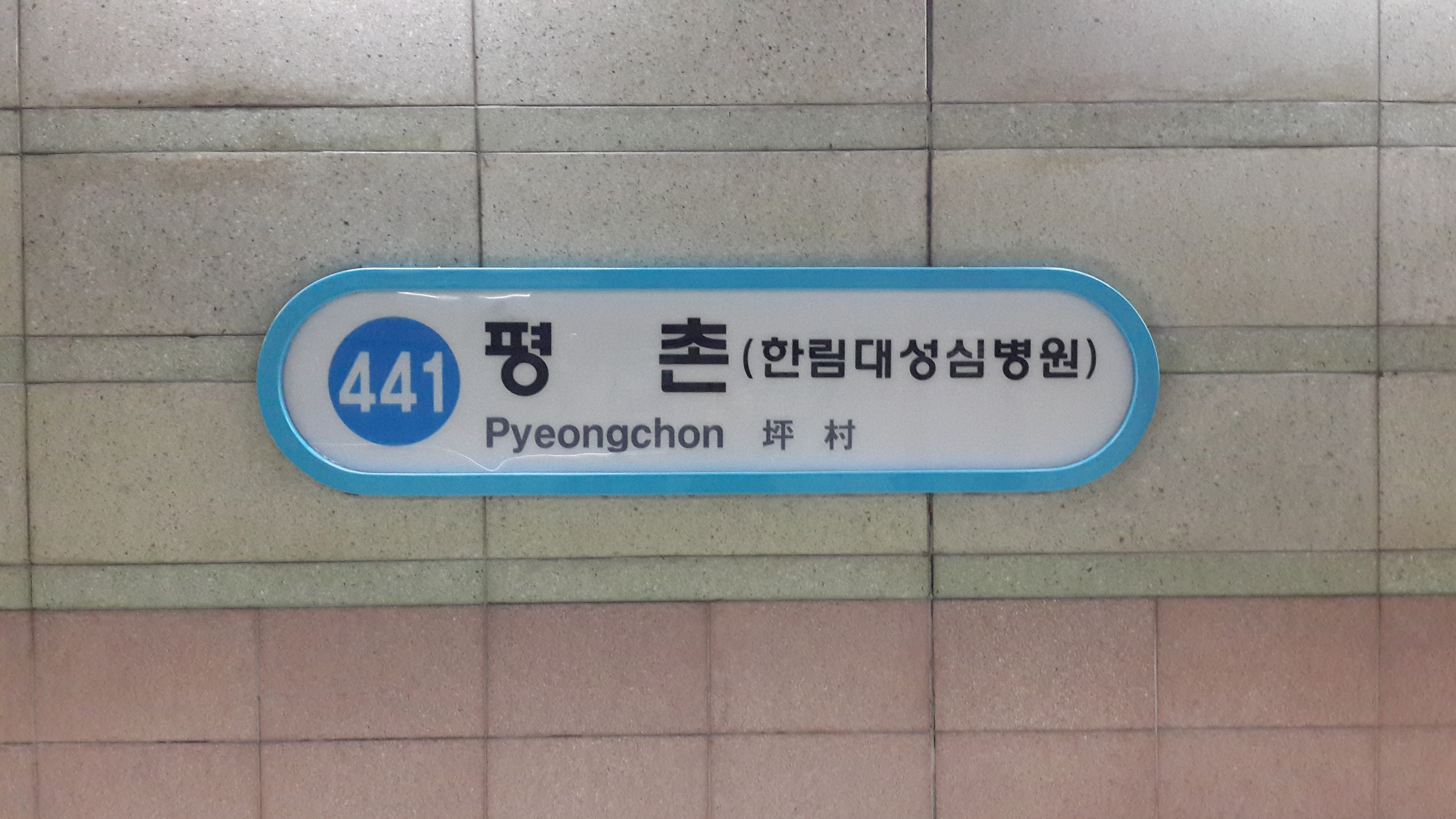 4호선 평촌역 역명판